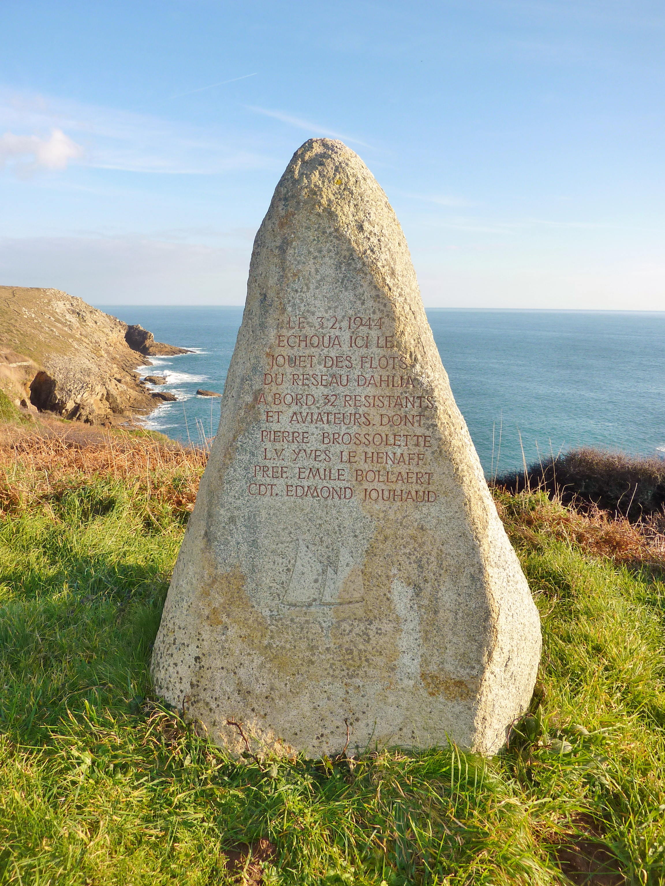 Plogoff : plaque commémorative de l'échouage du Jouet des Flots , qui transportait 32 aviateurs et résistants (dont Pierre Brossolette, Yves Le Hénaff, Émile Bollaërt, Edmond Jouhaud) le 3 février 1944 à Feunteun Aod